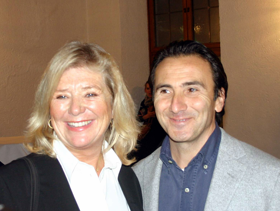 Die Schauspielerin Jutta Speidel, hier mit Bruno Maccallini, im November 2007 in München.